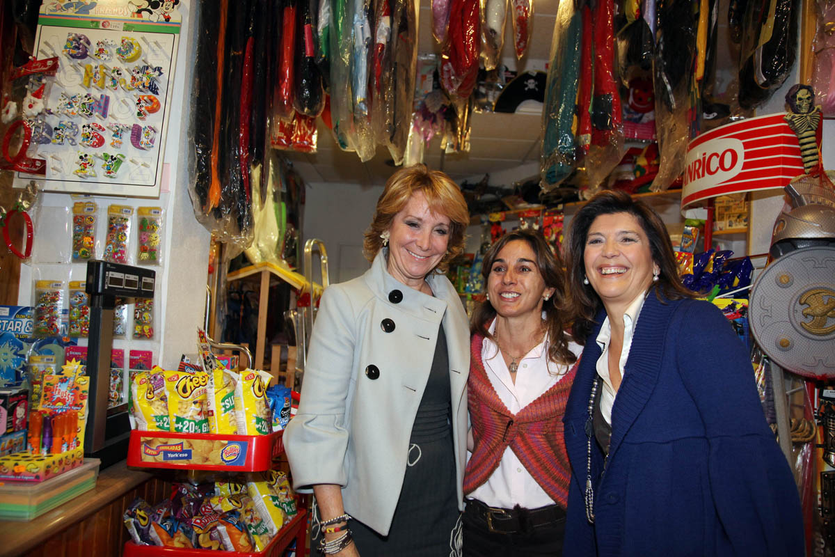 Aguirre inaugura sede PP Torrelodones, con Gádor Ongil